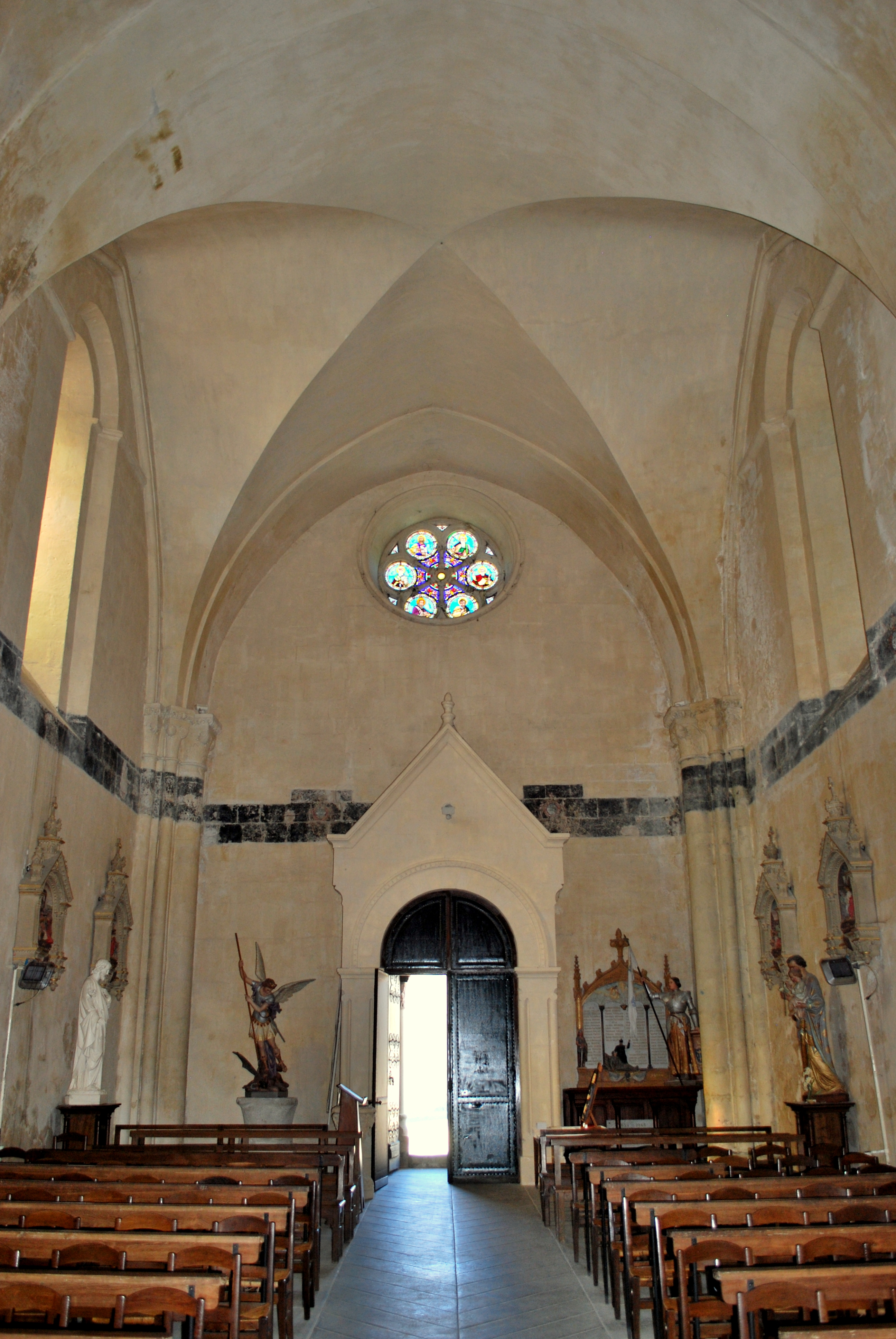 Intérieur de l'église Saint-Fortunat de Saint-Fort-sur-Gironde